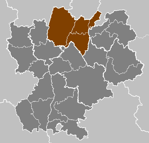 Maps of arrondissements and cantons of France: Département de l Ain.PNG (Région Rhône-Alpes)